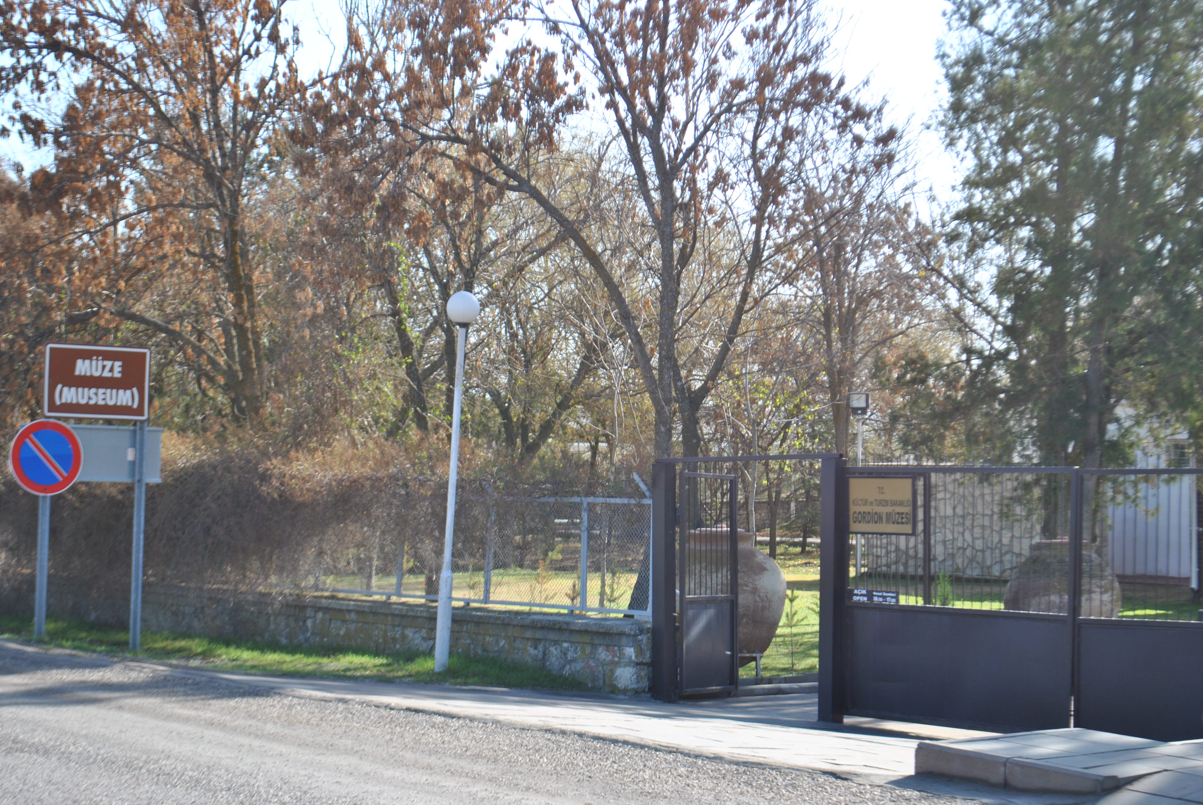 Gordion Müzesi'nin giriş kapısı ve tabelası